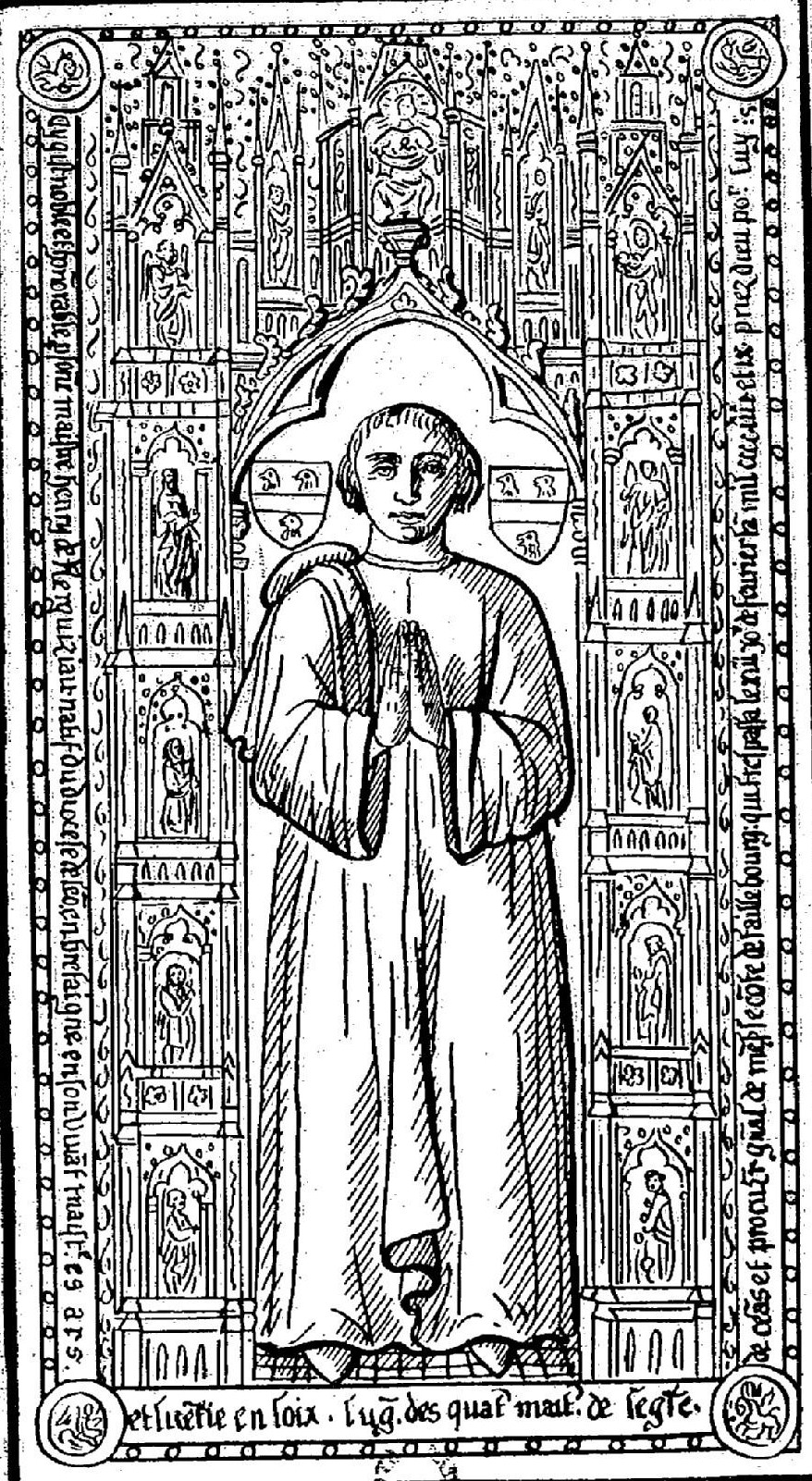 Tombe d'Henri de Kerguiziau décédé en 1489 (chapelle de la confrérie Saint-Yves de Paris, démolie en 1796 )